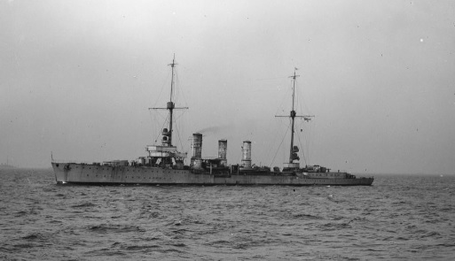 中文（中国大陆）: 前往斯卡帕湾途中的其中一艘柯尼斯堡级小巡洋舰